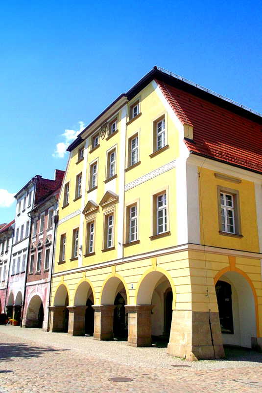 Kamienna Góra, pl. Wolności 11 - kamienica, obecnie "Muzeum Tkactwa Dolnośląskiego", XVIII, XIX w.